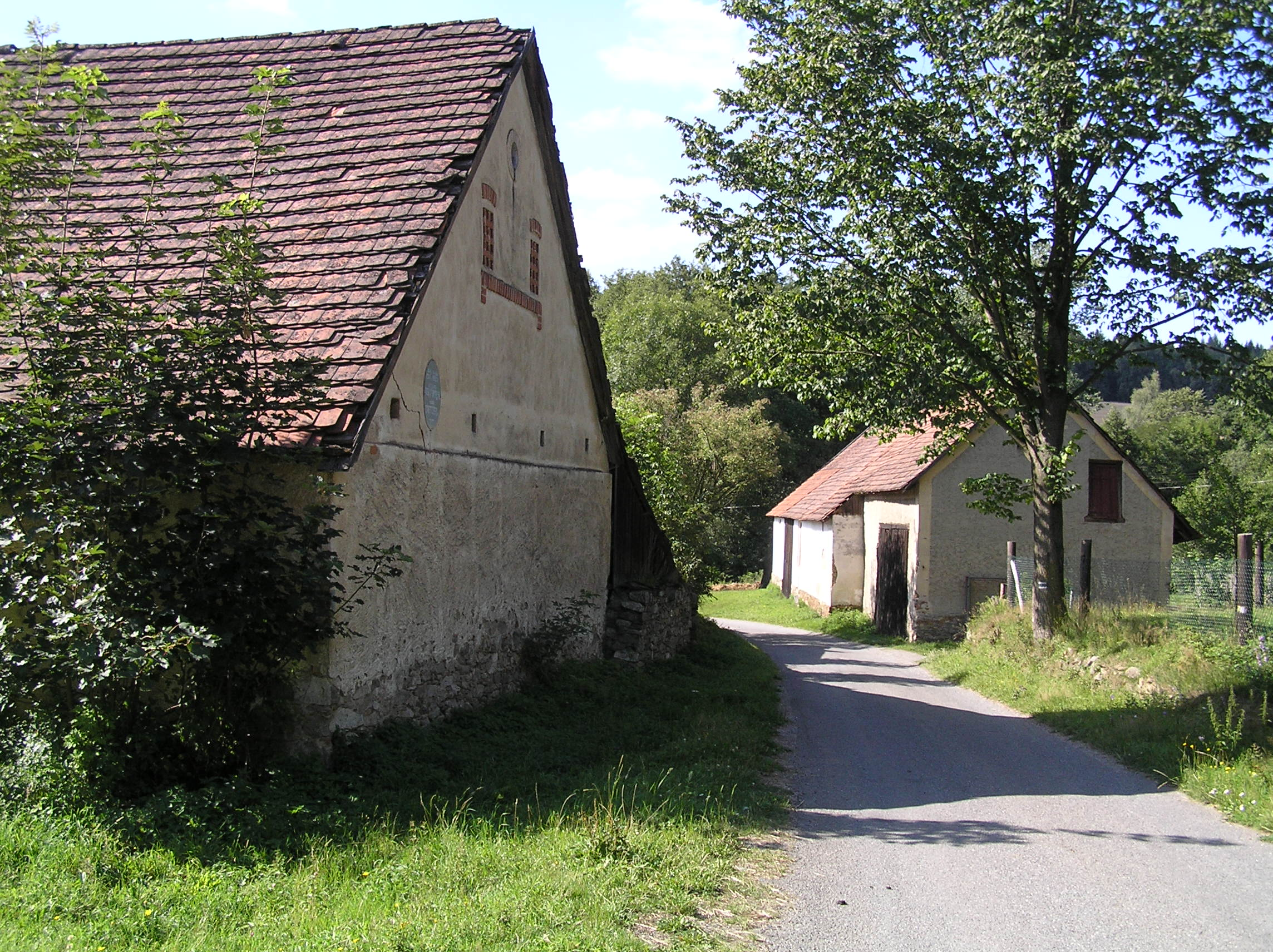 Třetužel - silnička přes ves